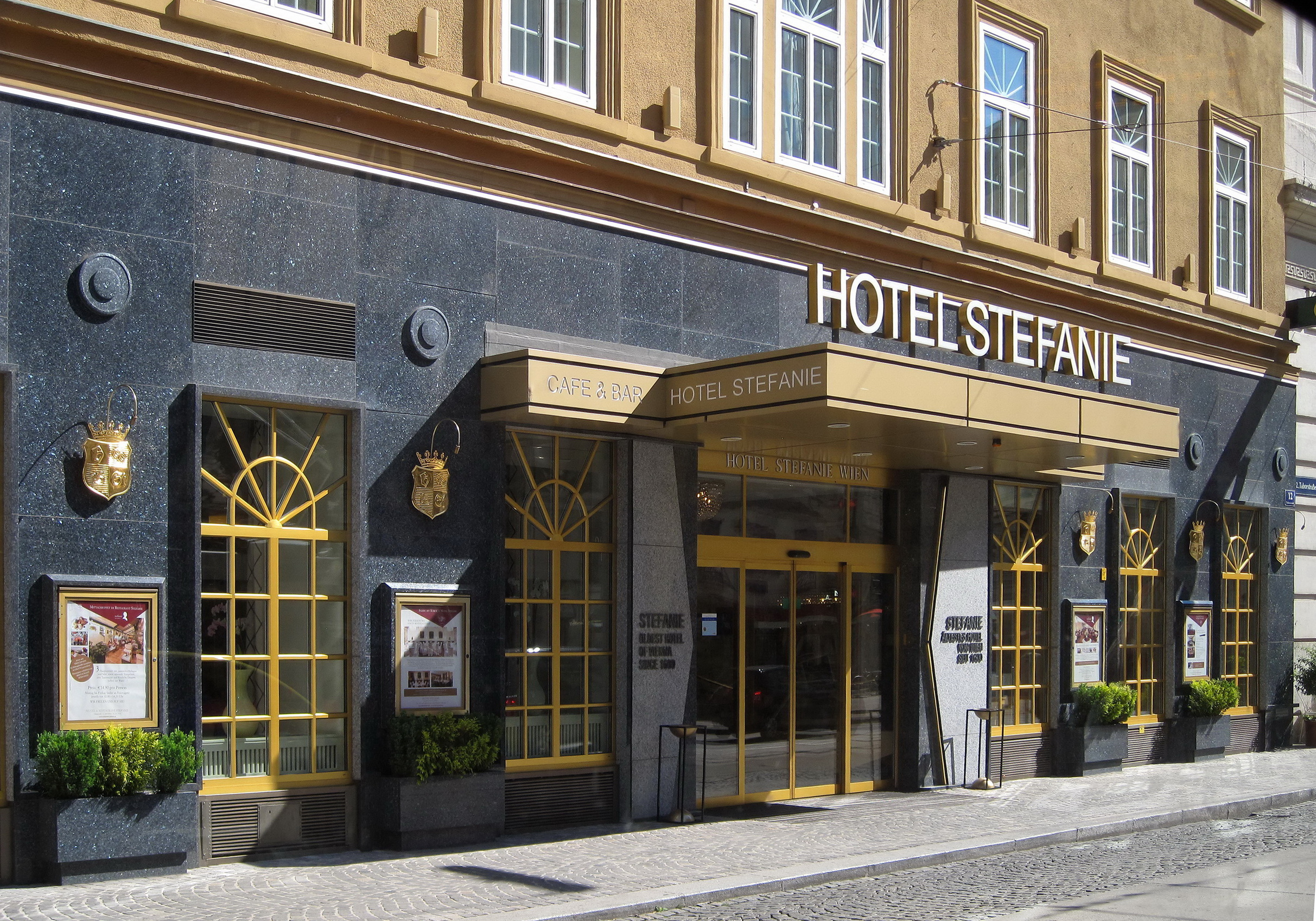 Eingangsbereich Hotel Stefanie in Wien, 2. Bezirk, Taborstraße 12. Ältestes Hotel Wiens.